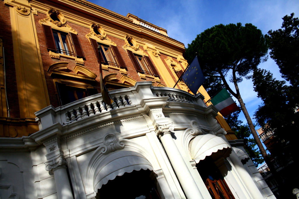 Facciata della palazzina sita in viale Pola, 12. Sede del Rettorato LUISS Guido Carli.